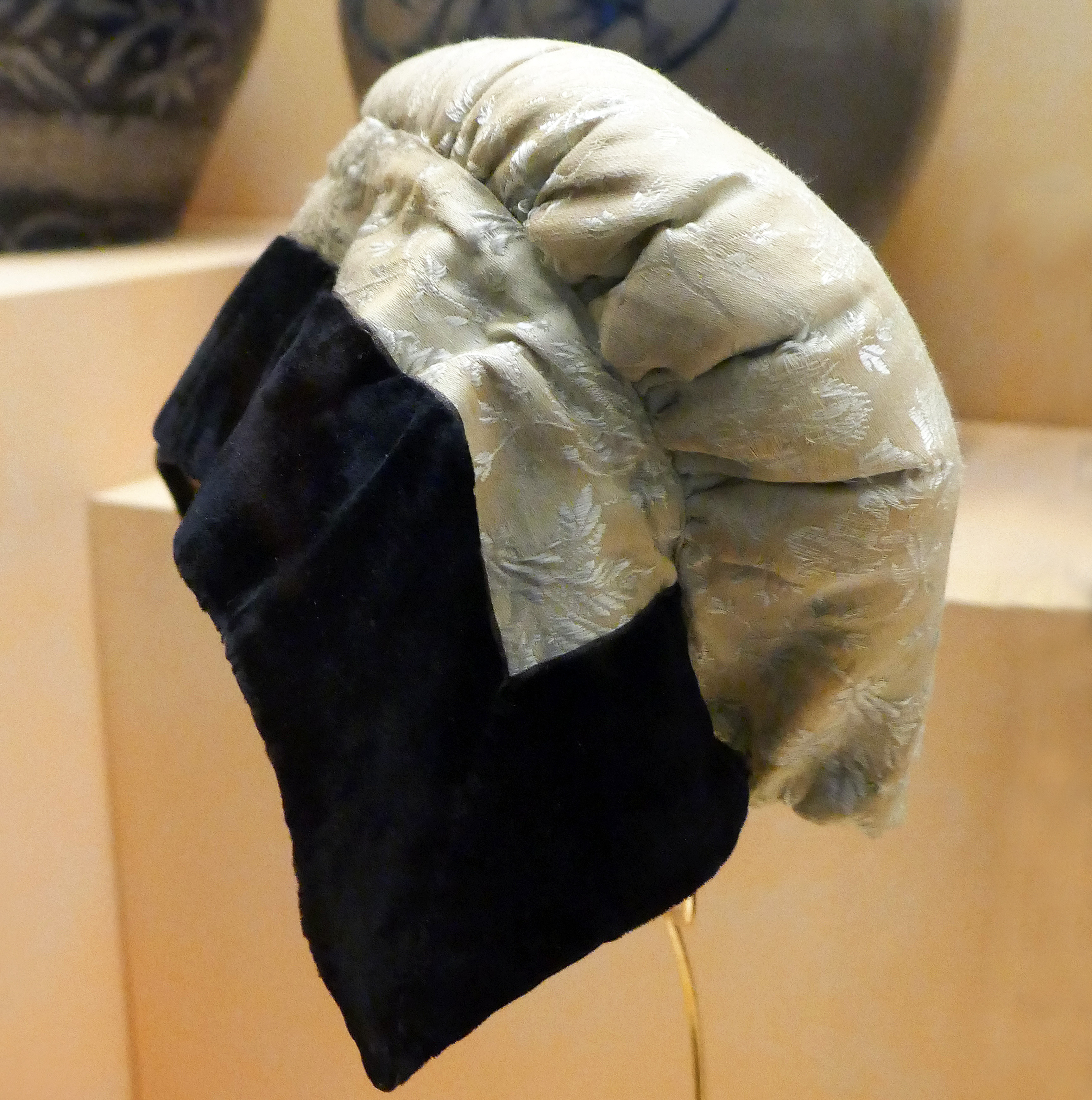 Bonnet matelassé. La Wantzenau ou Faubourg de Strasbourg, XIXe siècle. Fin du XIXe siècle, Alsace. Collections du Musée alsacien de Strasbourg. Exposition temporaire Costumes d'Alsace, étoffes d'un monde au Musée alsacien de Strasbourg (2018).